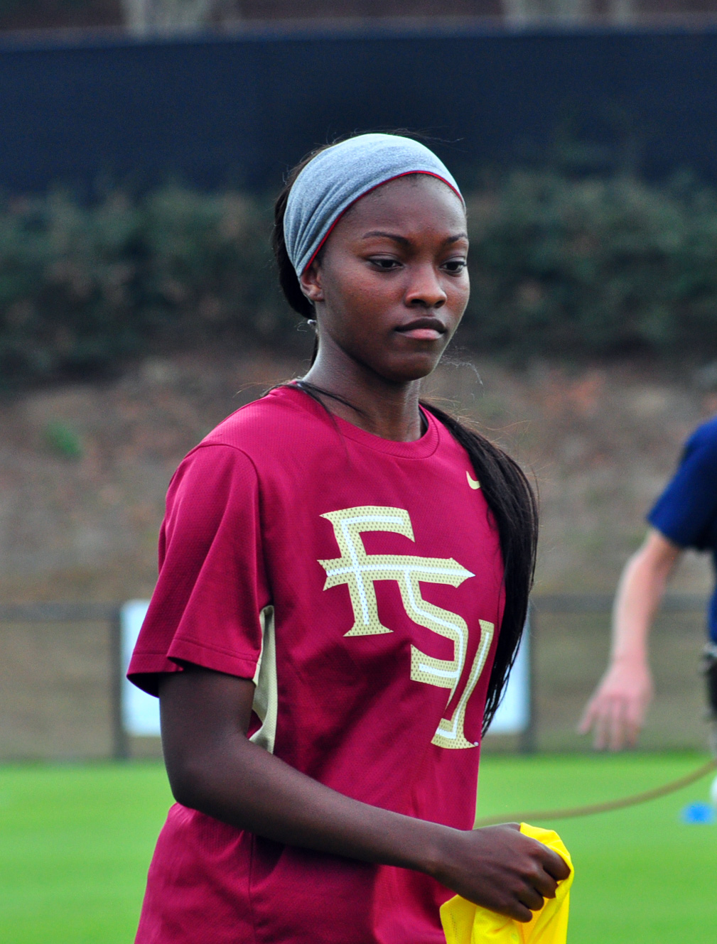 Cheyna Williams